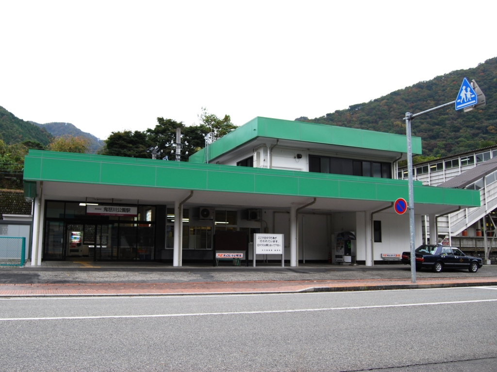 東武鉄道鬼怒川線鬼怒川公園駅駅舎全景（2008/10/26撮影）